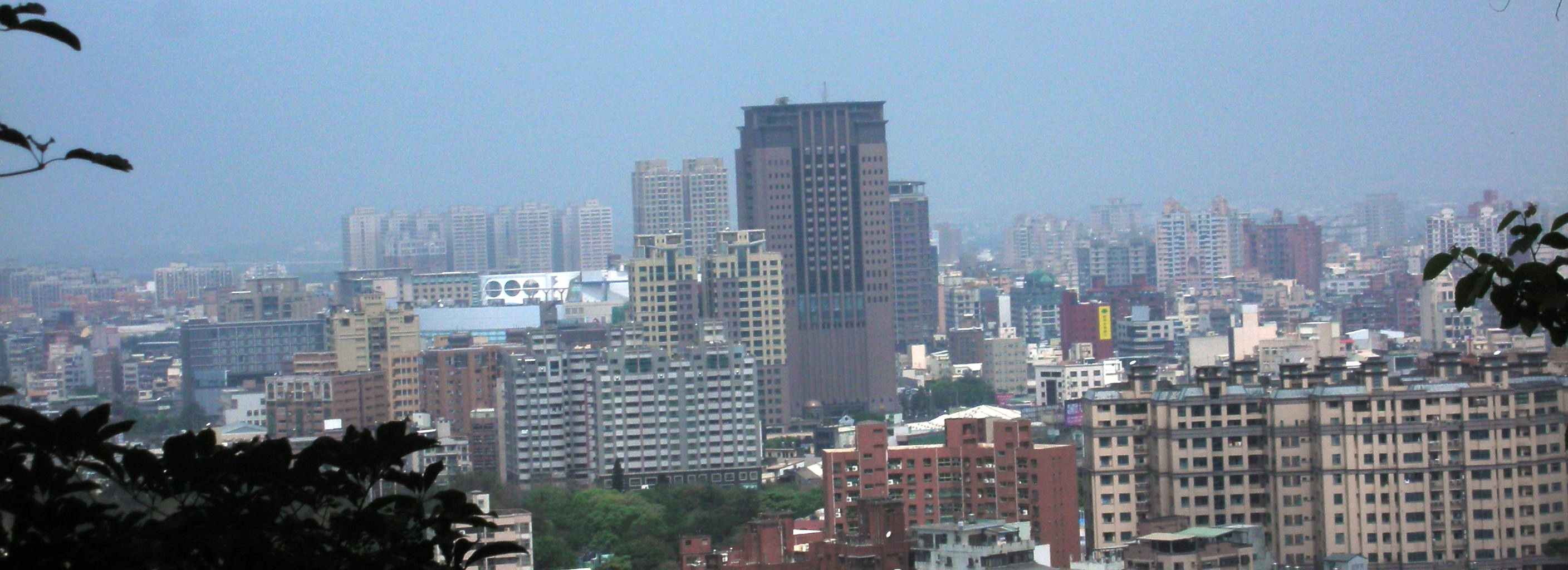 中華民國台灣新竹市天際線。